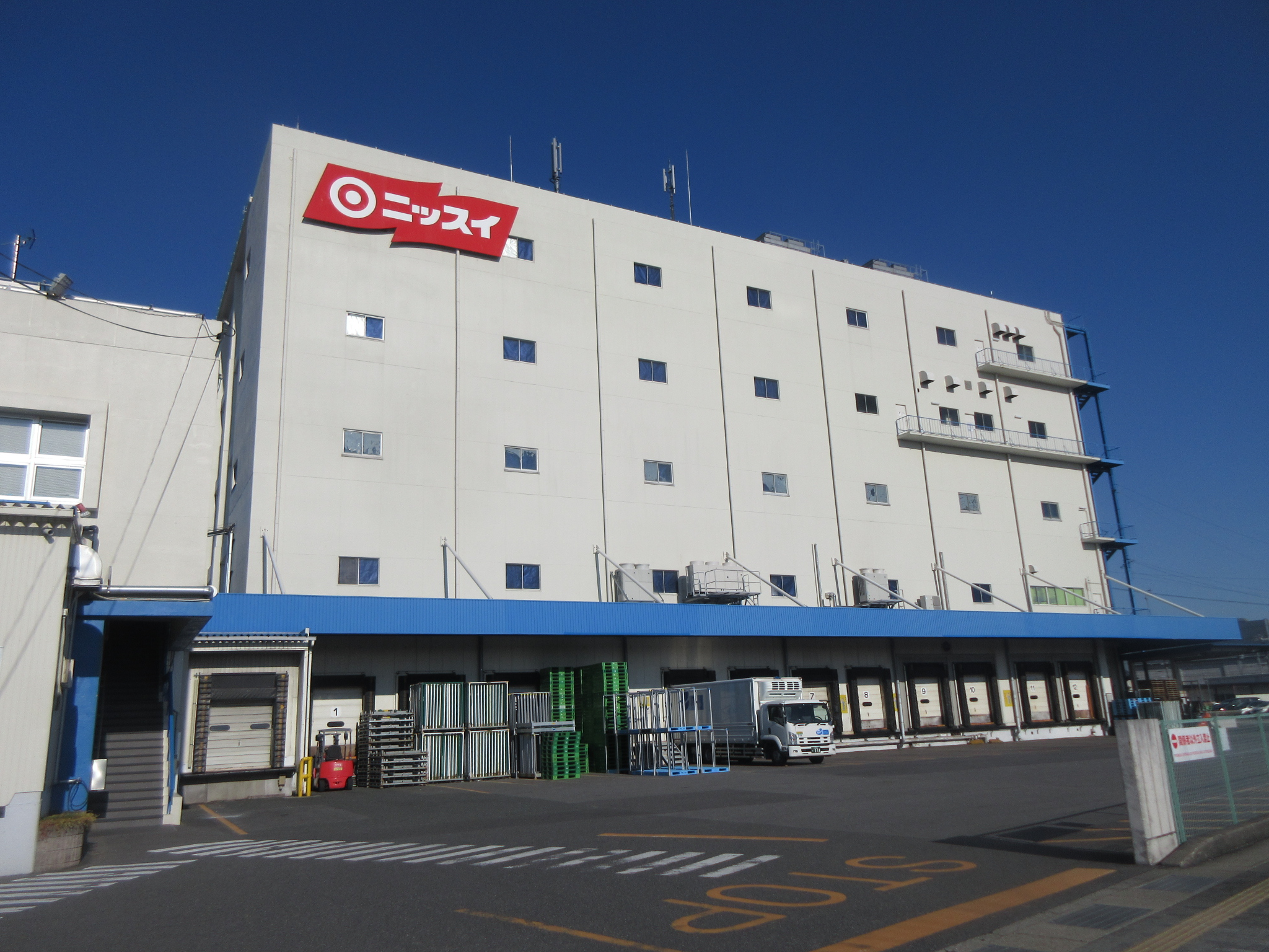 ニッスイ安城工場（愛知県安城市）